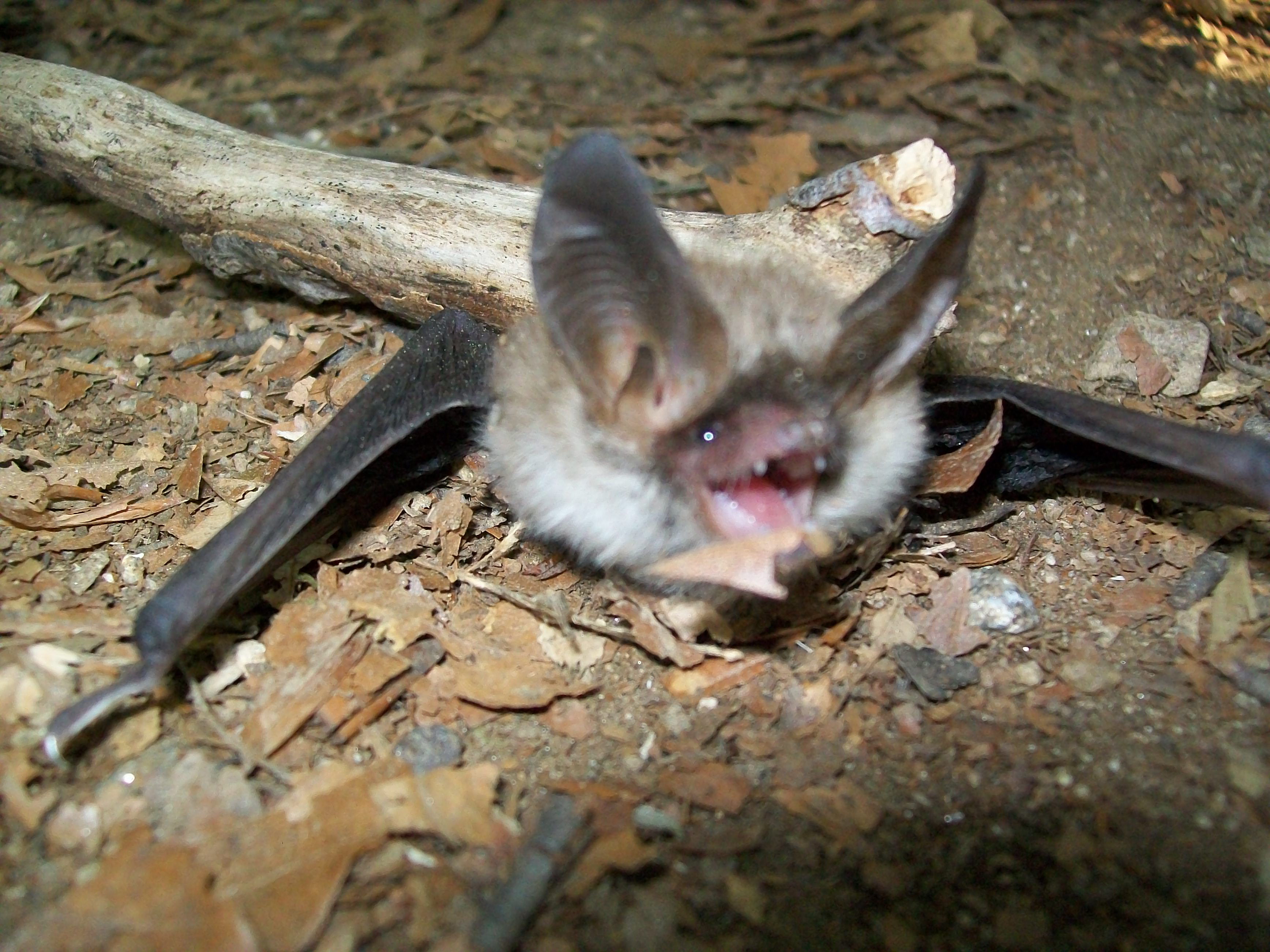 Пазителят на Гората в околностите на връх Богдан